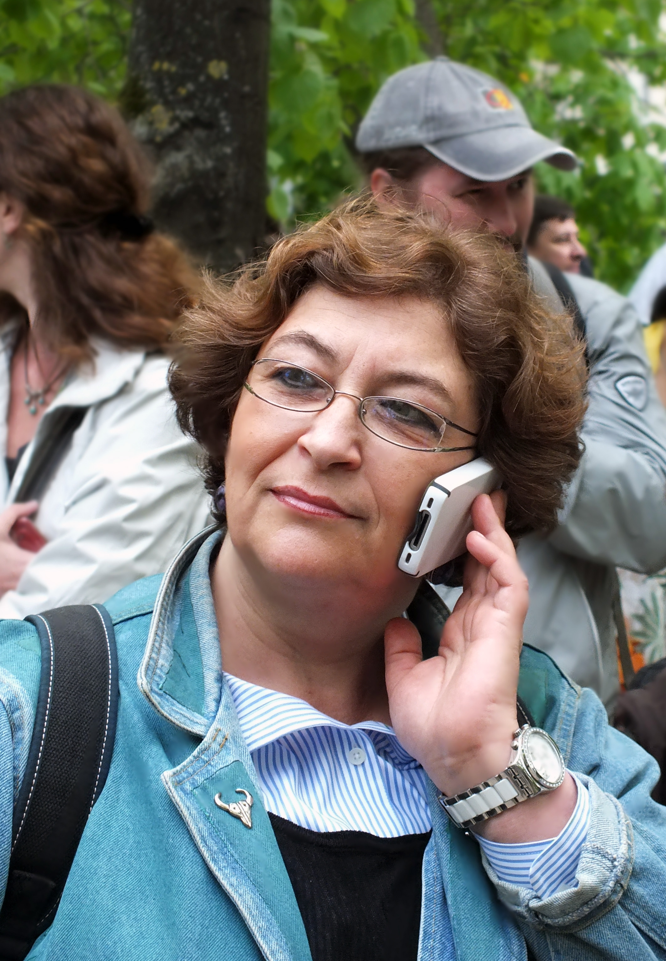 "Контрольная прогулка" с писателями. 2012.05.13